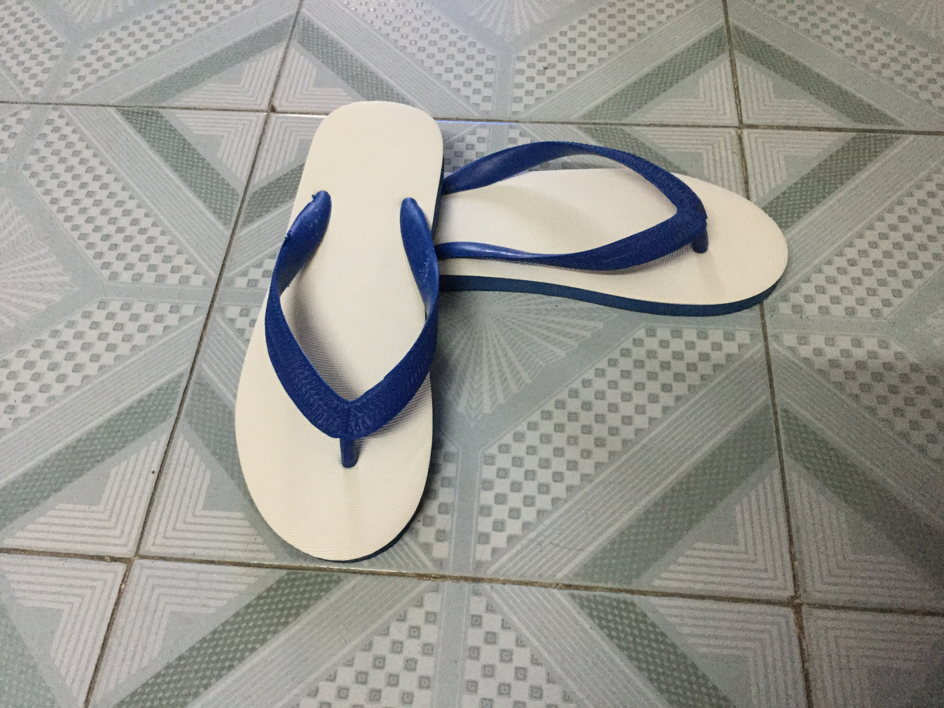 รองเท้าแตะช้างดาว